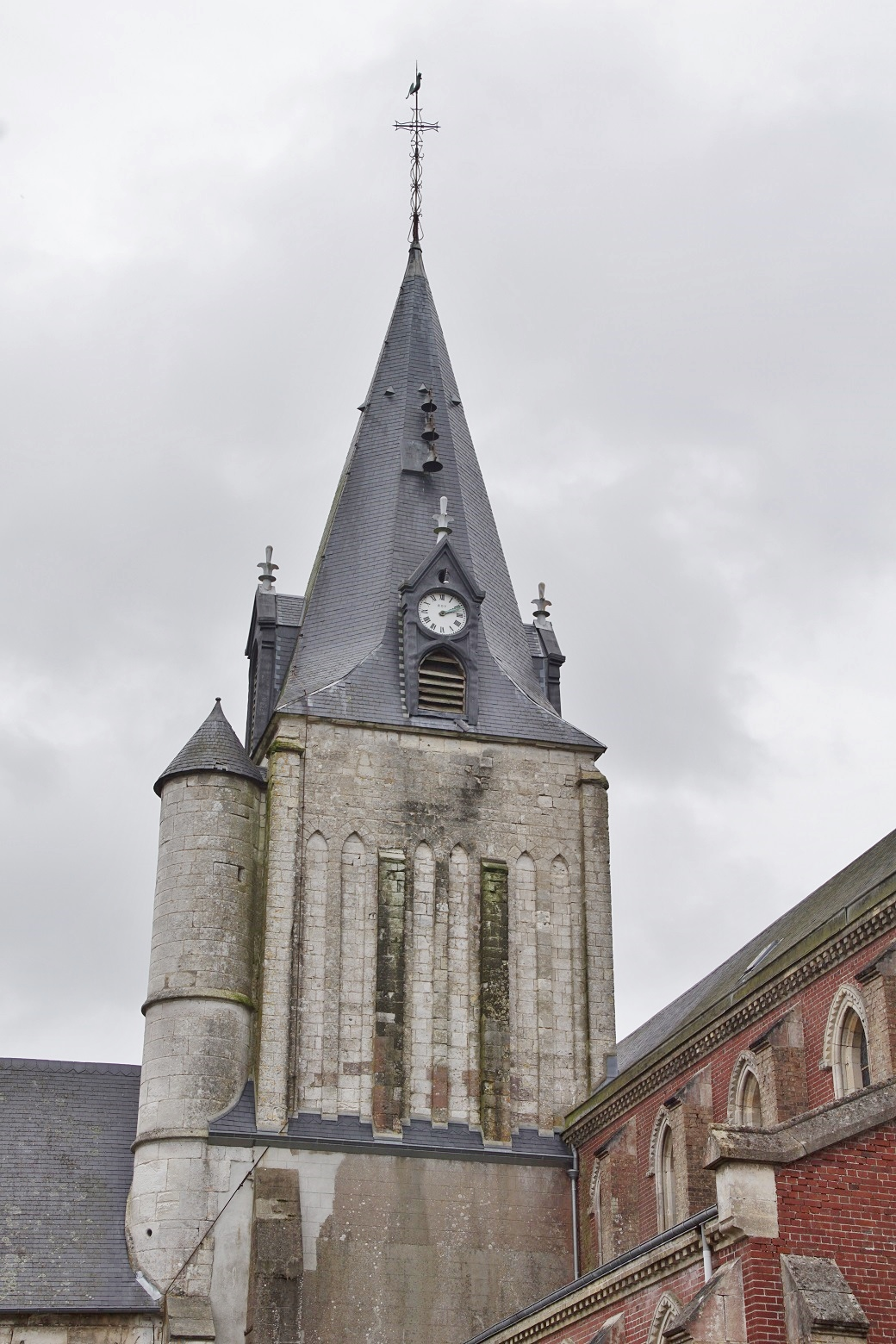 le Clochers église St Leger